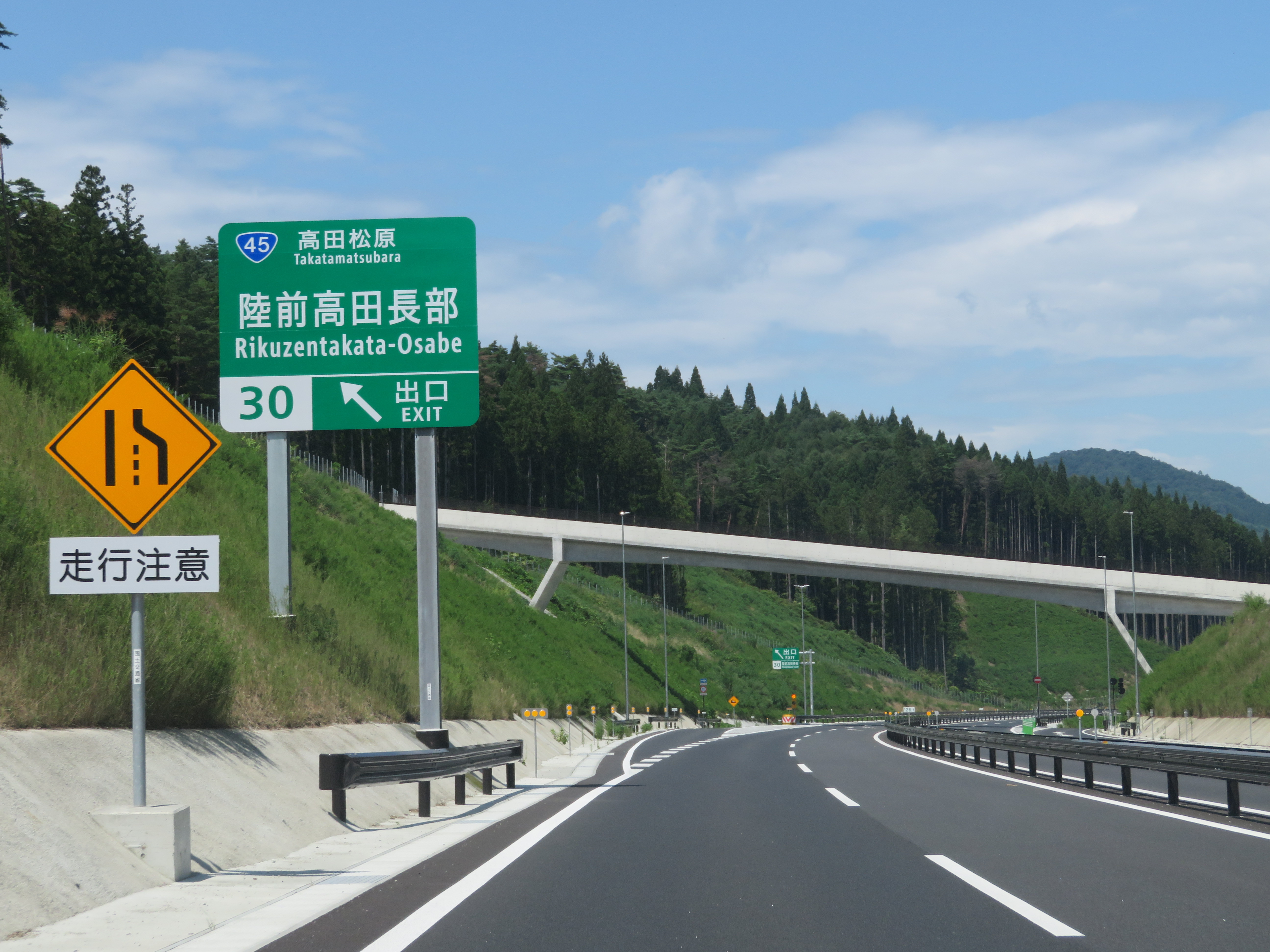 三陸自動車道 陸前高田長部インターチェンジ出口付近（気仙沼方面側から撮影）